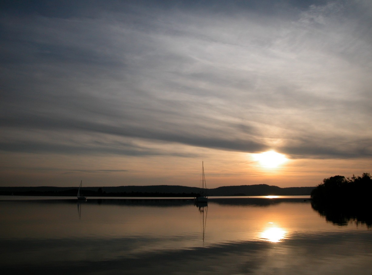 Lac de Madine